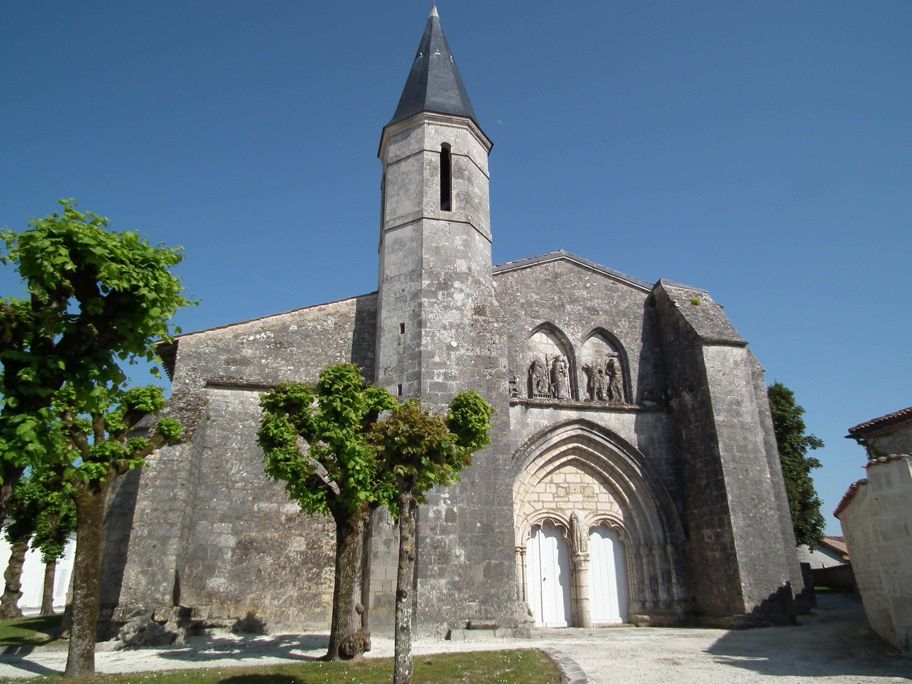 L'église de Grézac (Charente-Maritime)